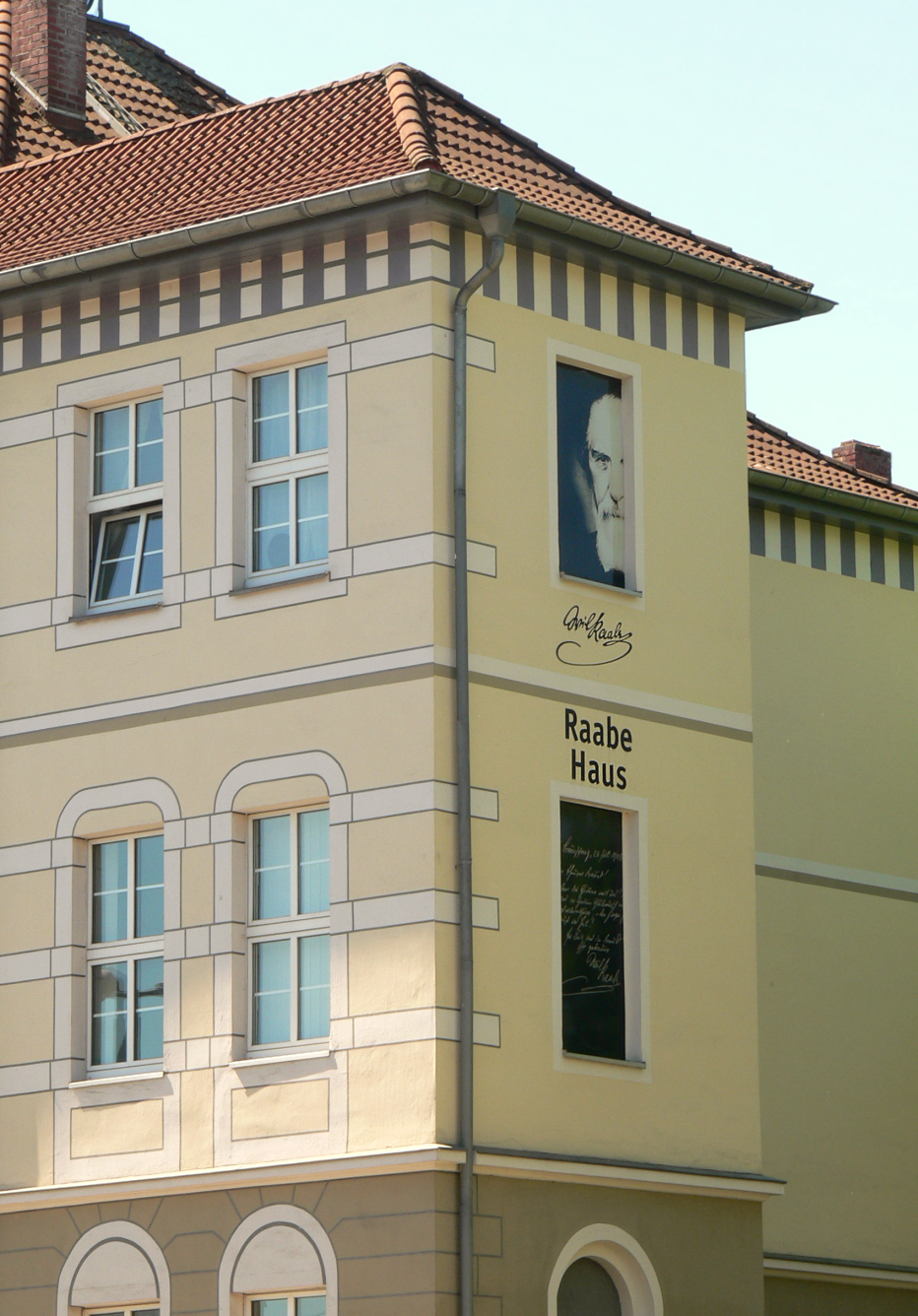 Raabehaus Braunschweig